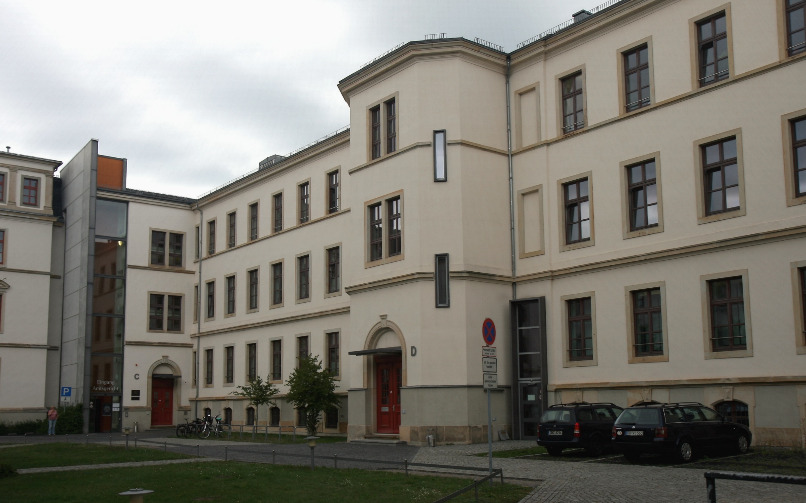 Amtsgericht Dresden, Außenstelle, Olbrichtplatz 1 in Dresden.